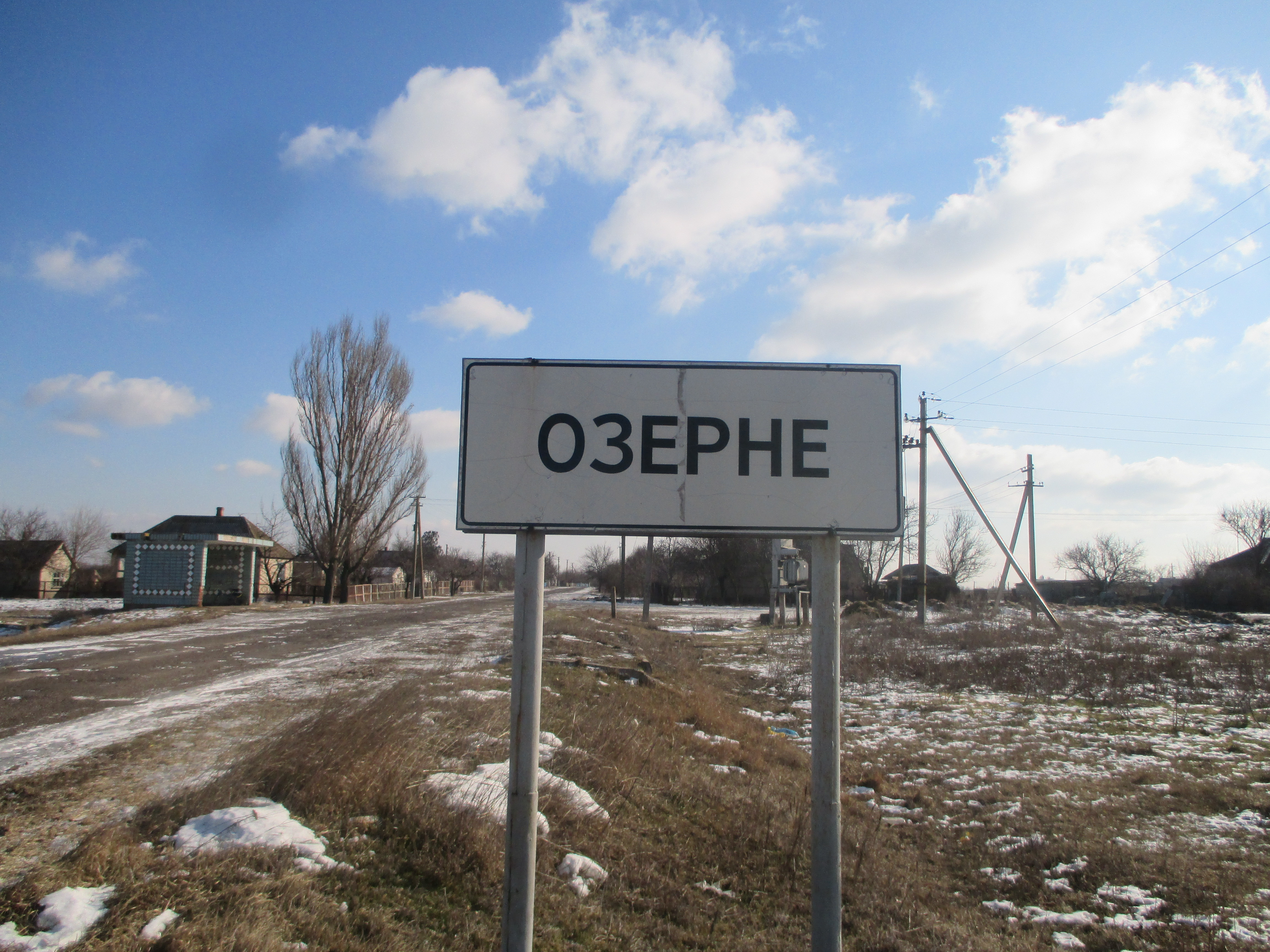 Таблиця